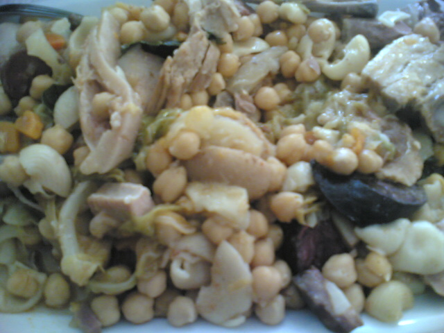 Rancho à moda de Viseu, a portuguese dish